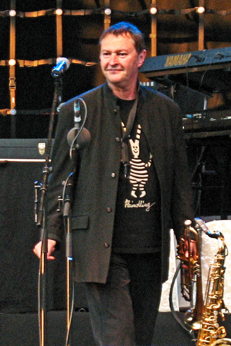 Hans-Jürgen Buchner von Haindling bei dem Konzert in Waldsassen 2008